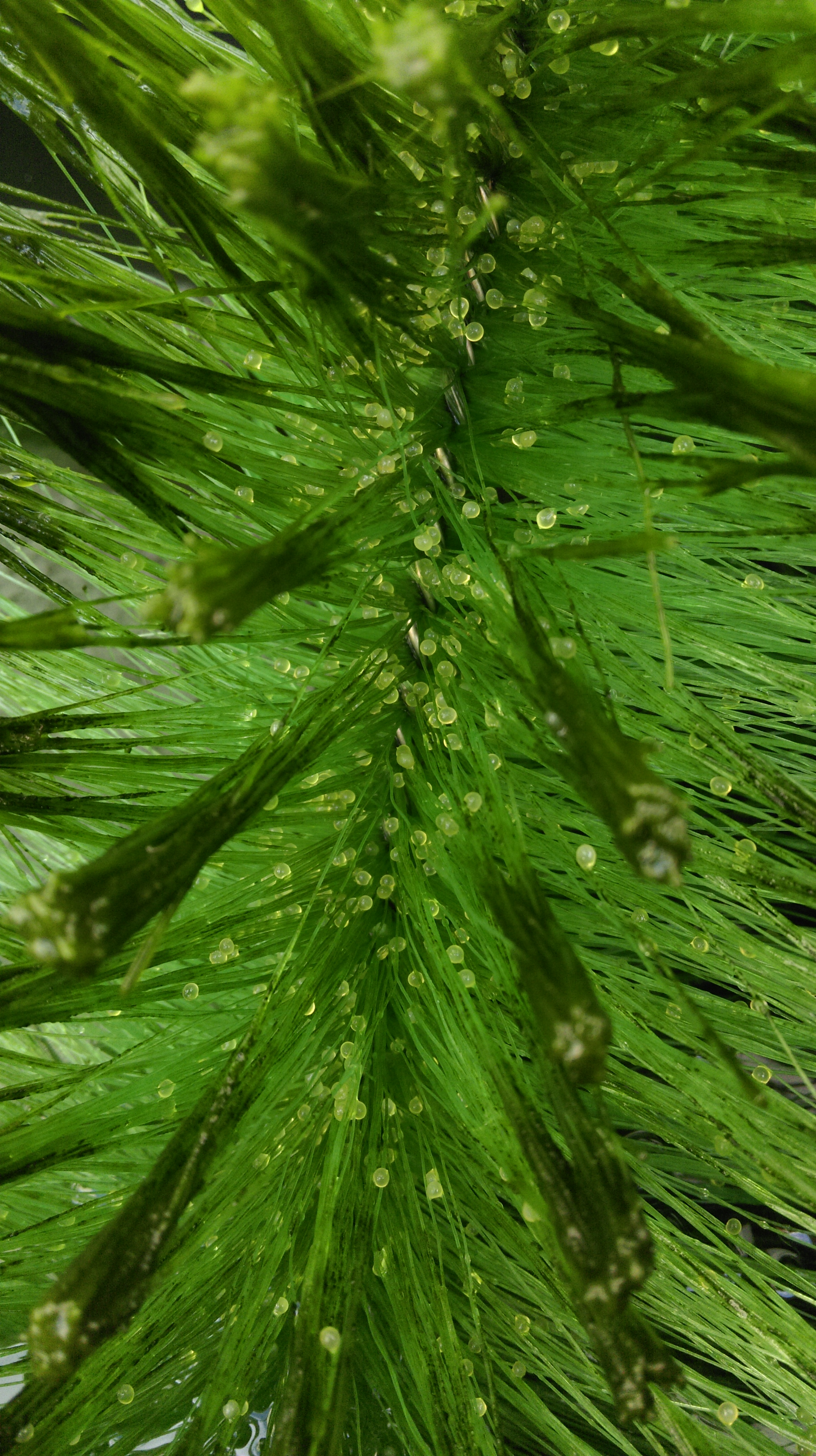 Koilaich in einer Ablaichbürste